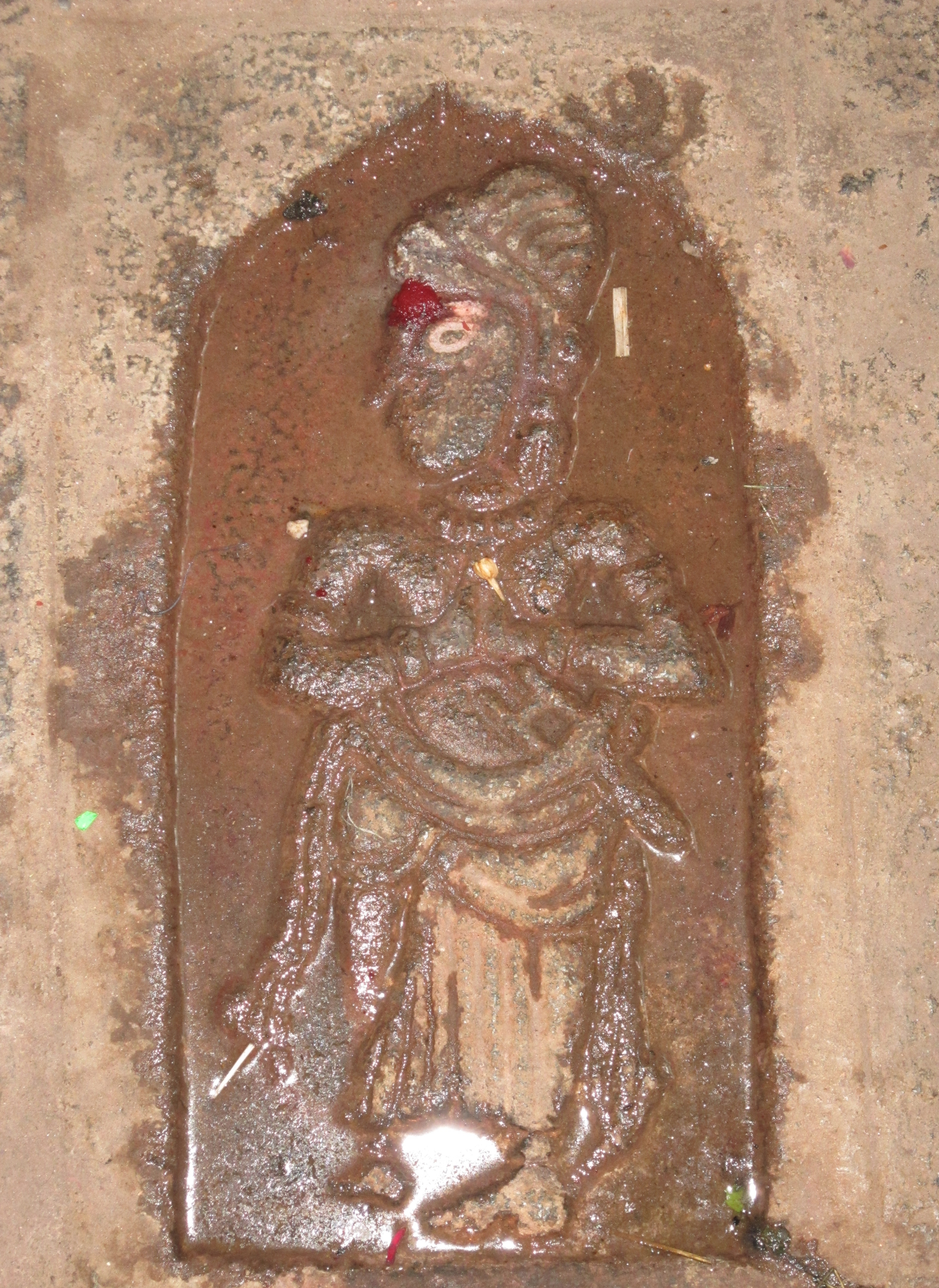 தென்காசி பாண்டியர்களில் முதல் மன்னனான சடையவர்மன் பராக்கிரம பாண்டியன். தன்னால் தென்காசி பெரிய கோவிலை கட்டி முடிக்க இயலாது என்றறிந்தவுடன் இக்கோயிலுக்கு வரும் பக்தர்களும் அதற்கு உதவ வேண்டும் என்று எண்ணம் கொண்டார். அதன்படி இங்கு வரும் பக்தர்கள் அனைவரின் காணிக்கையையும் ஏற்று அவர்களின் பாதம் பற்றி வணங்குவேன் என்று தான் கொடுத்த வாக்கை காப்பாற்றுவதற்காக தன் உருவத்தை கோயிலின் வாசலிலேயே பதித்துக் கொண்டார் சடைவர்மன் பராக்கிரம பாண்டியன்.